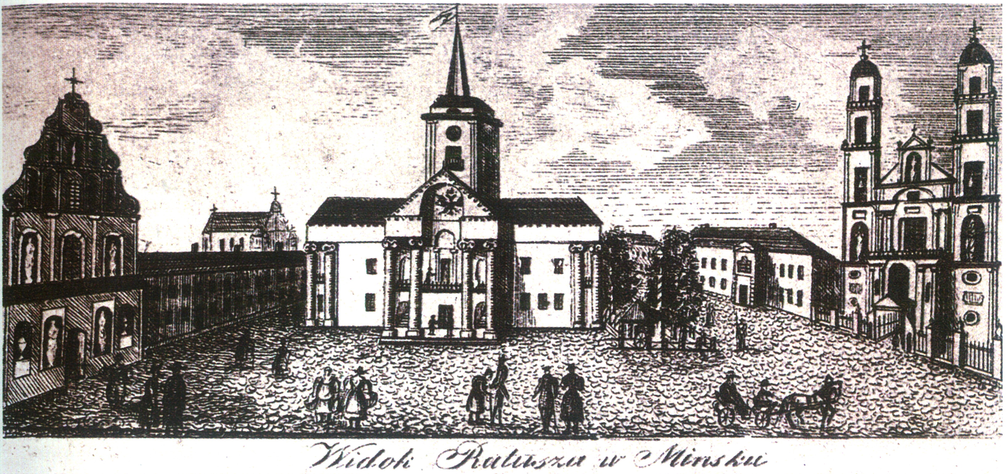 Беларуская (тарашкевіца): Менск (Miensk), пляц Высокі Рынак (plac Vysoki Rynak). Царква Сьвятога Духа, манастыр базылянаў, ратуша, касьцёл Унебаўзяцьця Найсьвяцейшай Панны Марыі